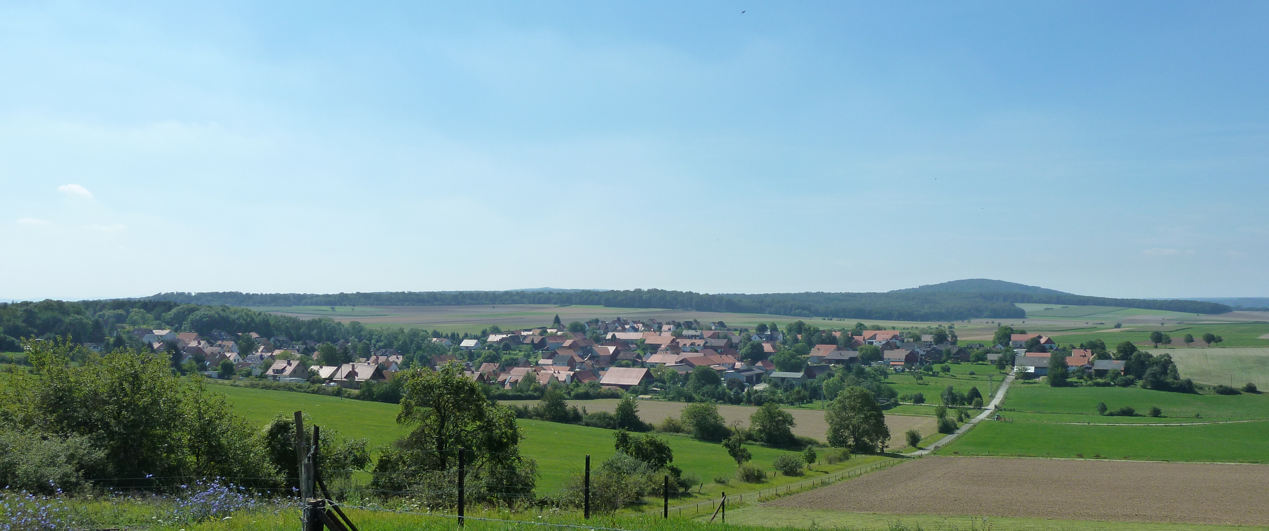 Blick von Nordosten vom Kuhberg auf Esebeck, Stadt Göttingen, Südniedersachsen (Deutschland).